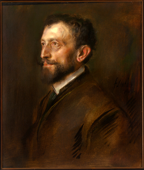 Jacques Rosenthal (1904) Portrait von Lenbach - gescannt von siehe Source - Freigaber für das Bild von Bernard M. Rosenthal per Mail erhalten - Artikel dazu z. B. [1] etc. - bitte noch um Geduld, Herr B. Rosenthal schrieb mir heute per Mail, dass ich das aufgefüllte Formular ihm zumailen soll--Bene16 (talk) 13:04, 2 December 2012 (UTC)